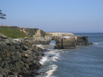 Santa Cruz USA 2004 Klif. Zdjęcie własne